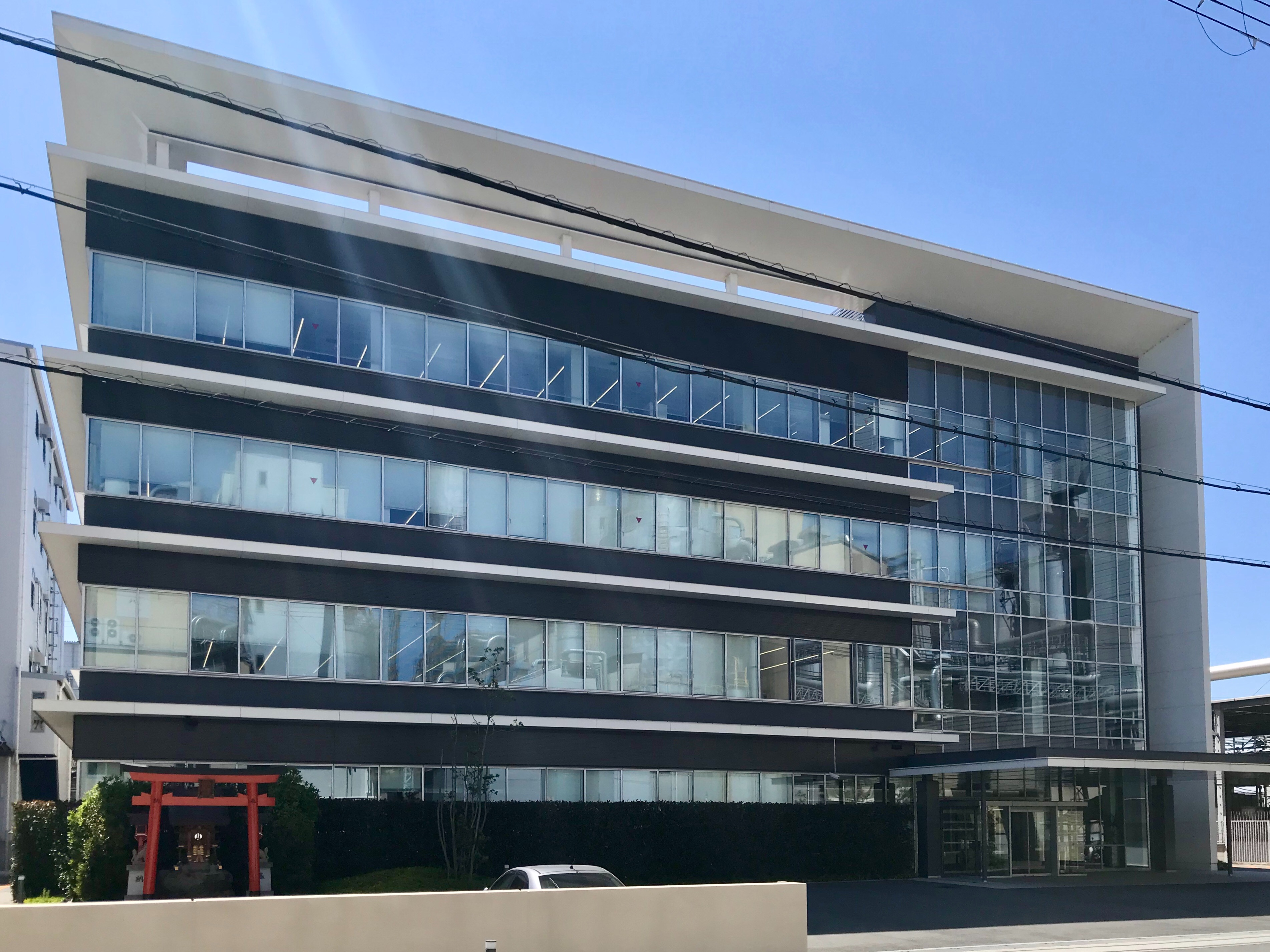 三和澱粉本社